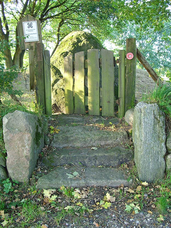 Munkwolstrup Arnkiel Park Eingang